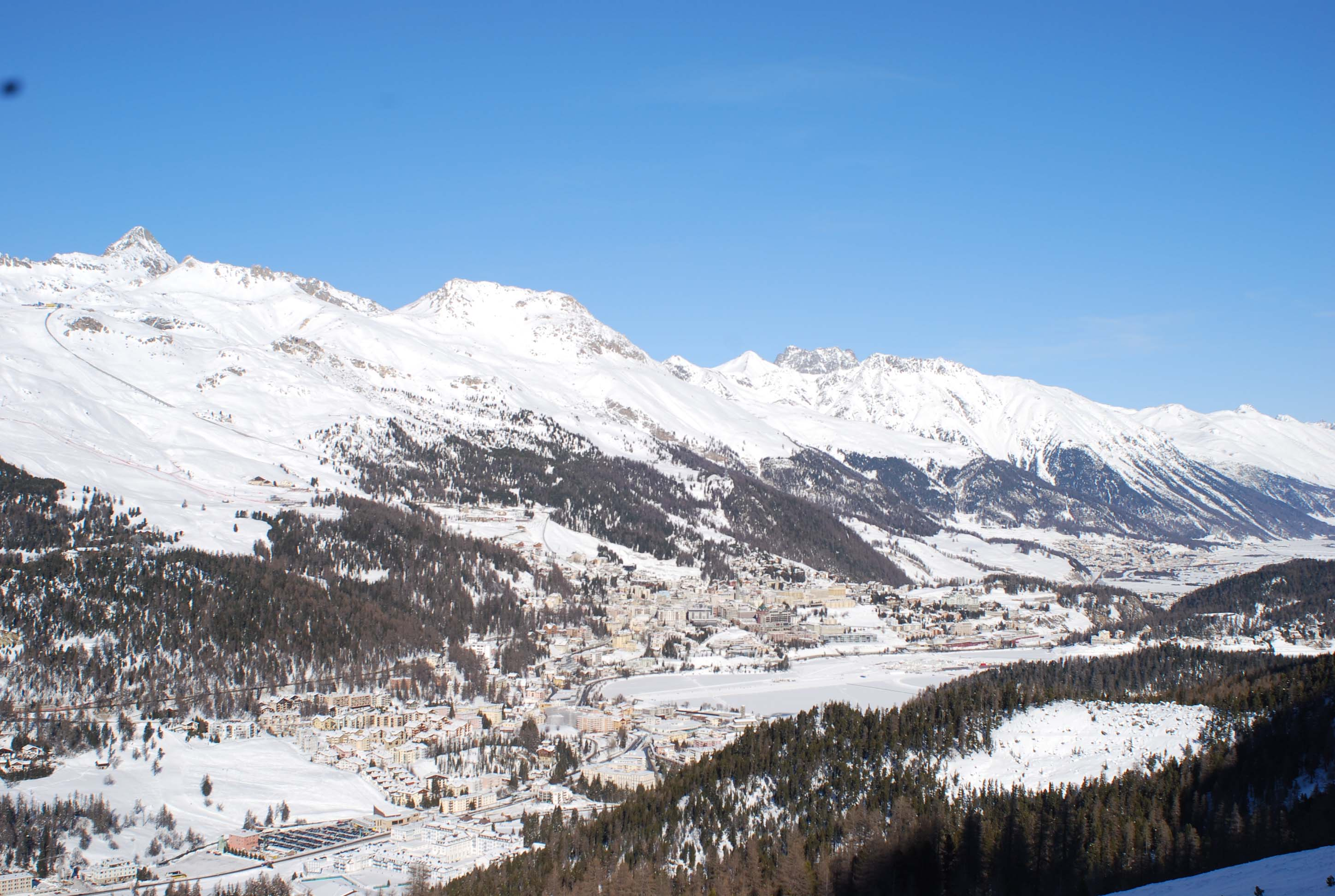 St. Moritz from Corvatsch